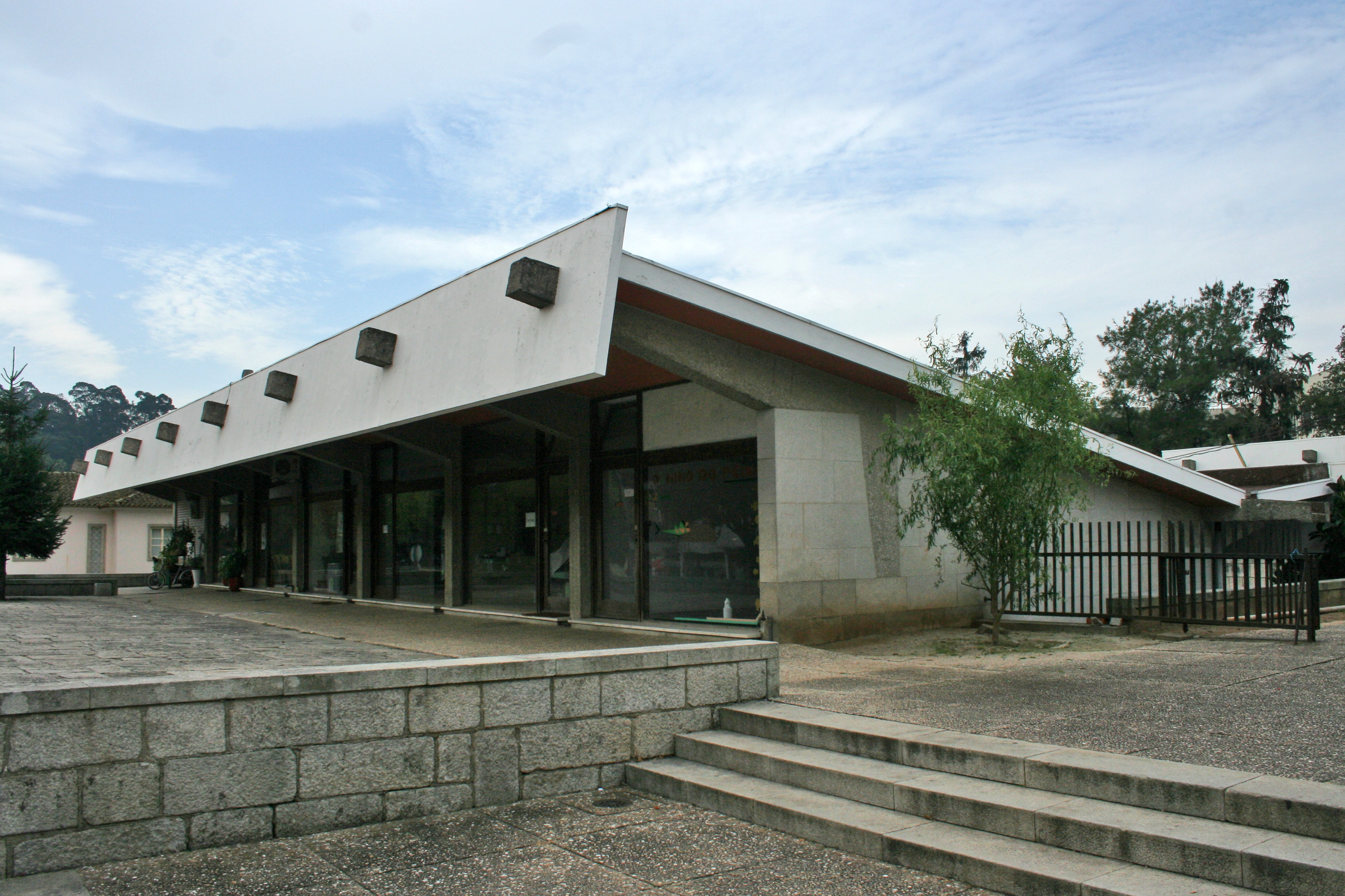 Mercado Municipal de Santa Maria da Feira This file was uploaded for Wiki Loves Monuments in Portugal with the unique identifier 6325648.